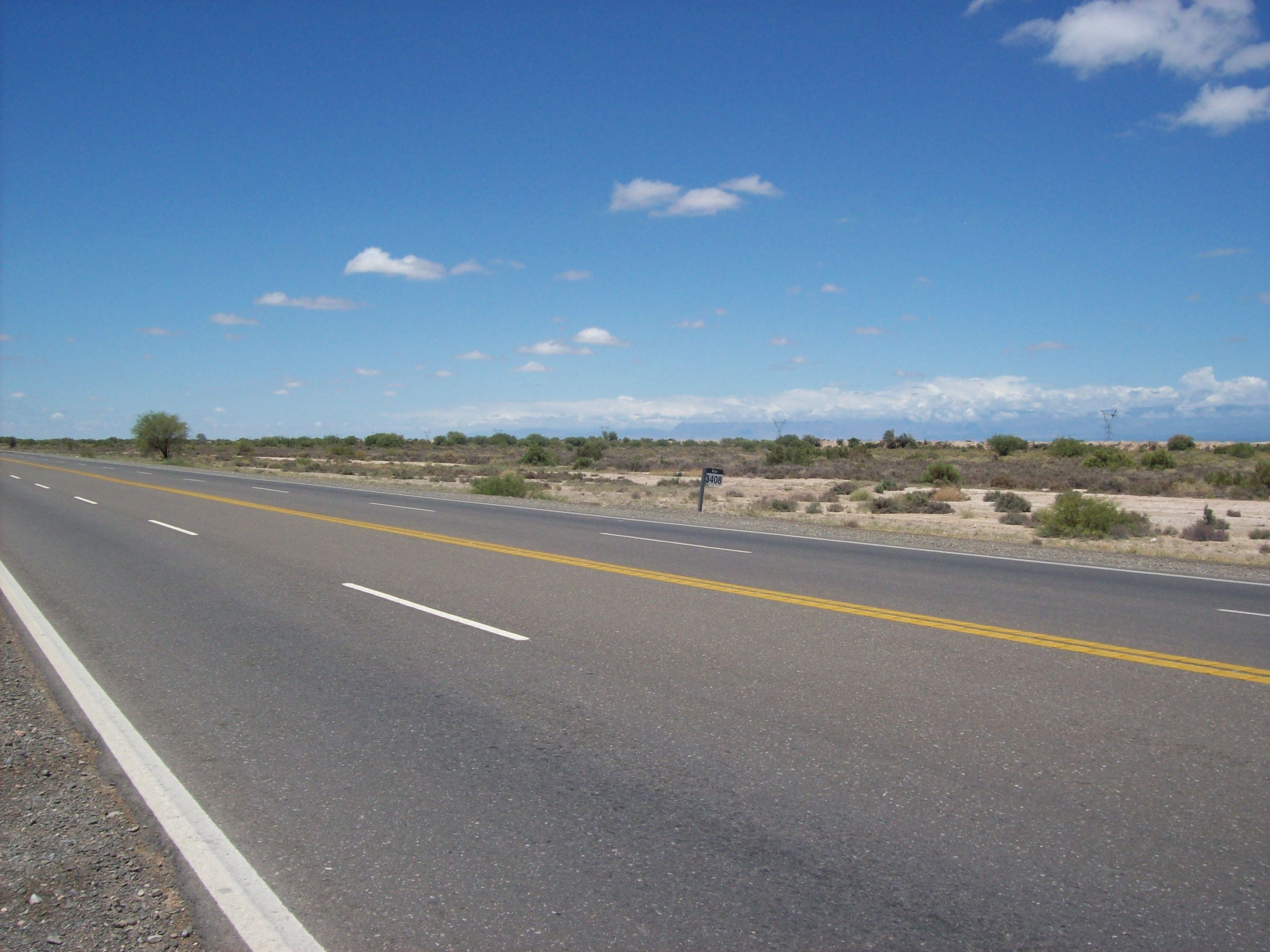 Multitrocha en la Ruta Nacional 40 en las cercanías de Media Agua, Provincia de San Juan, Argentina.